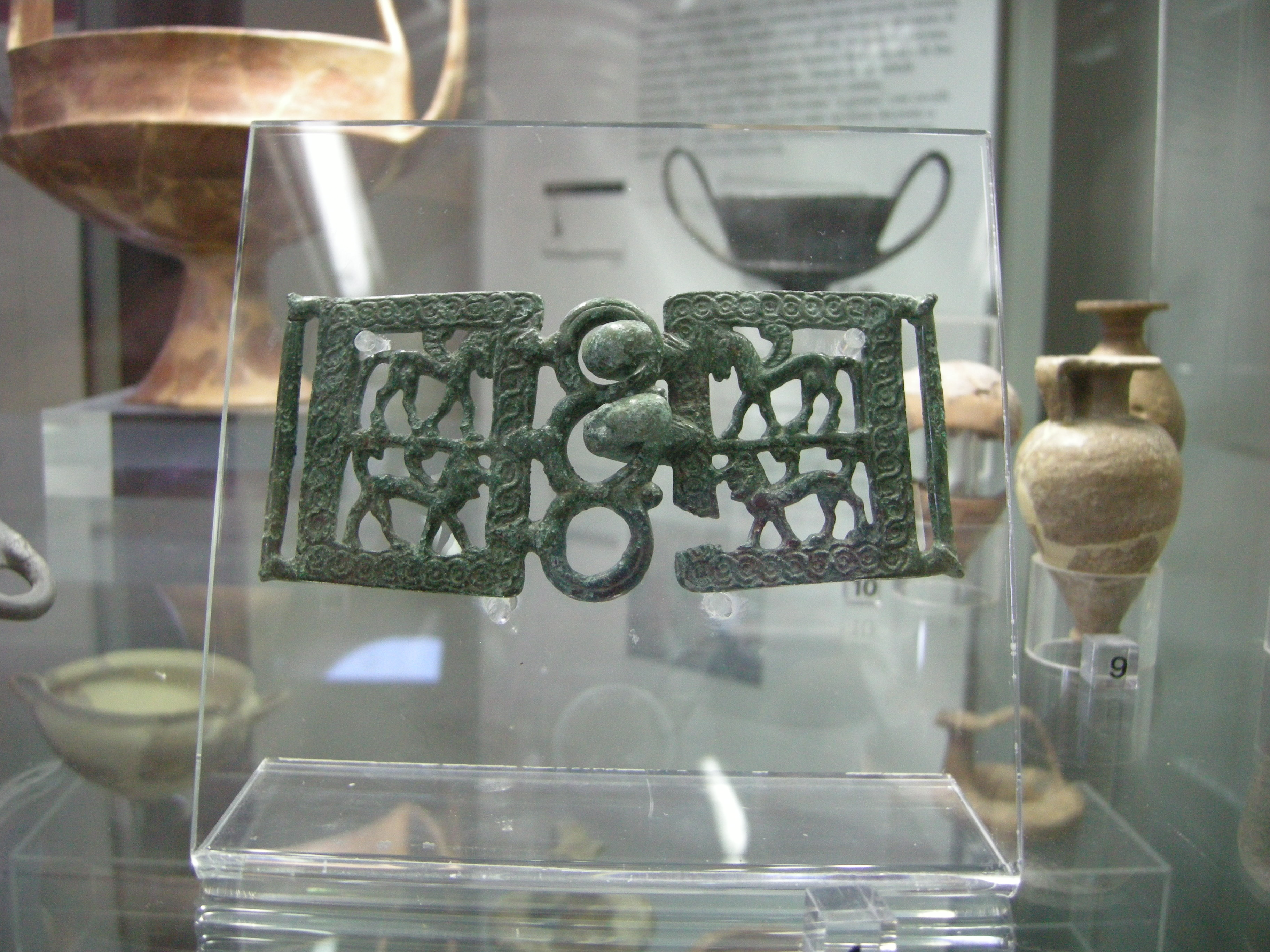 Museo archeologico di massa marittima, fibbia etrusca